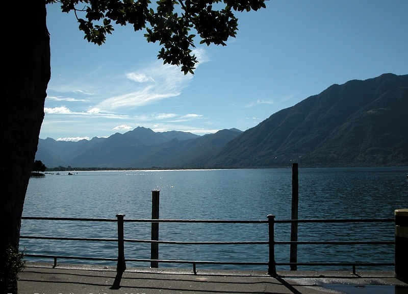 Locarno, Schweiz, 2005 - Blick auf den See